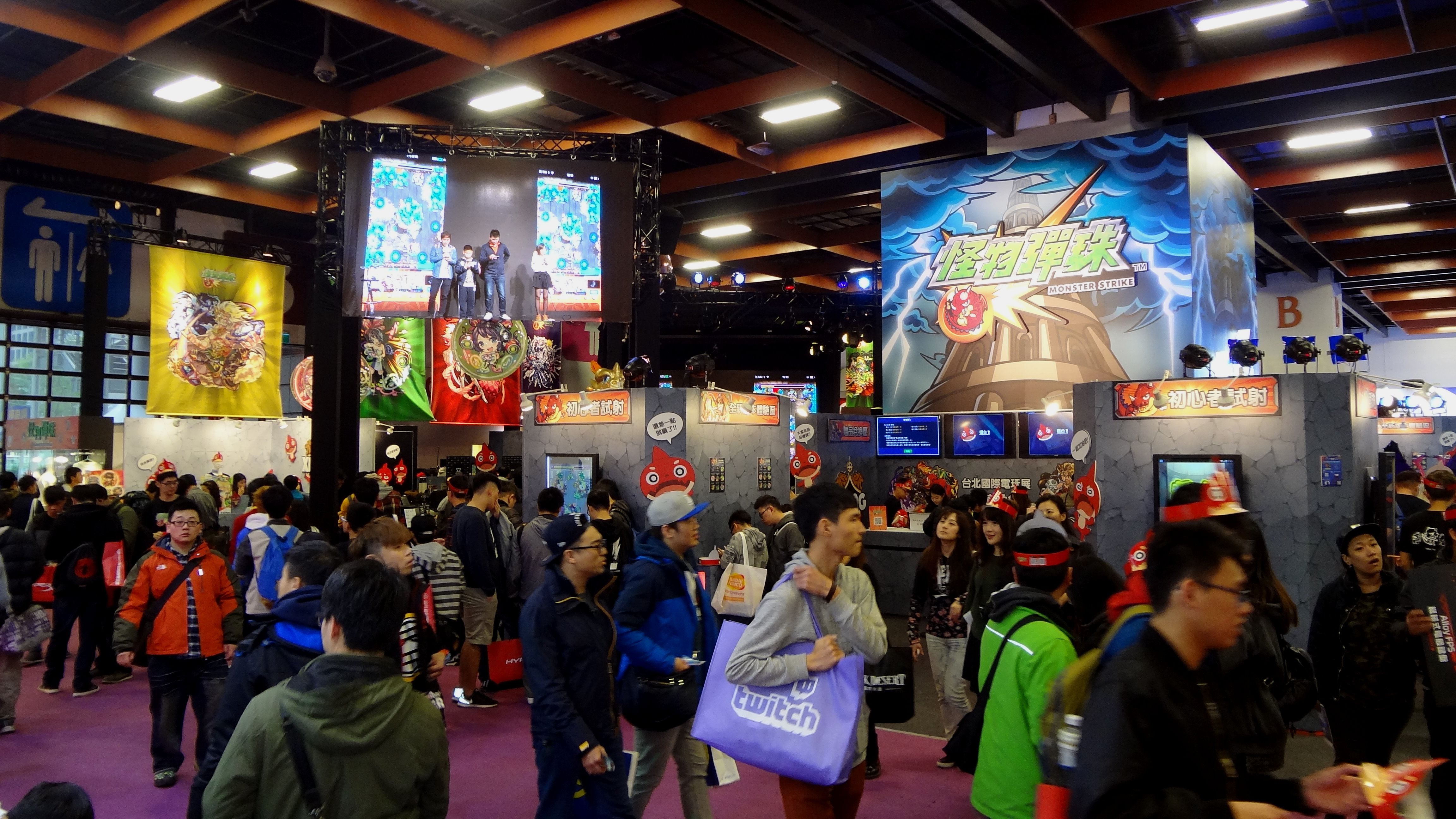 中文（台灣）: 2017臺北國際電玩展，mixi《怪物彈珠》攤位。